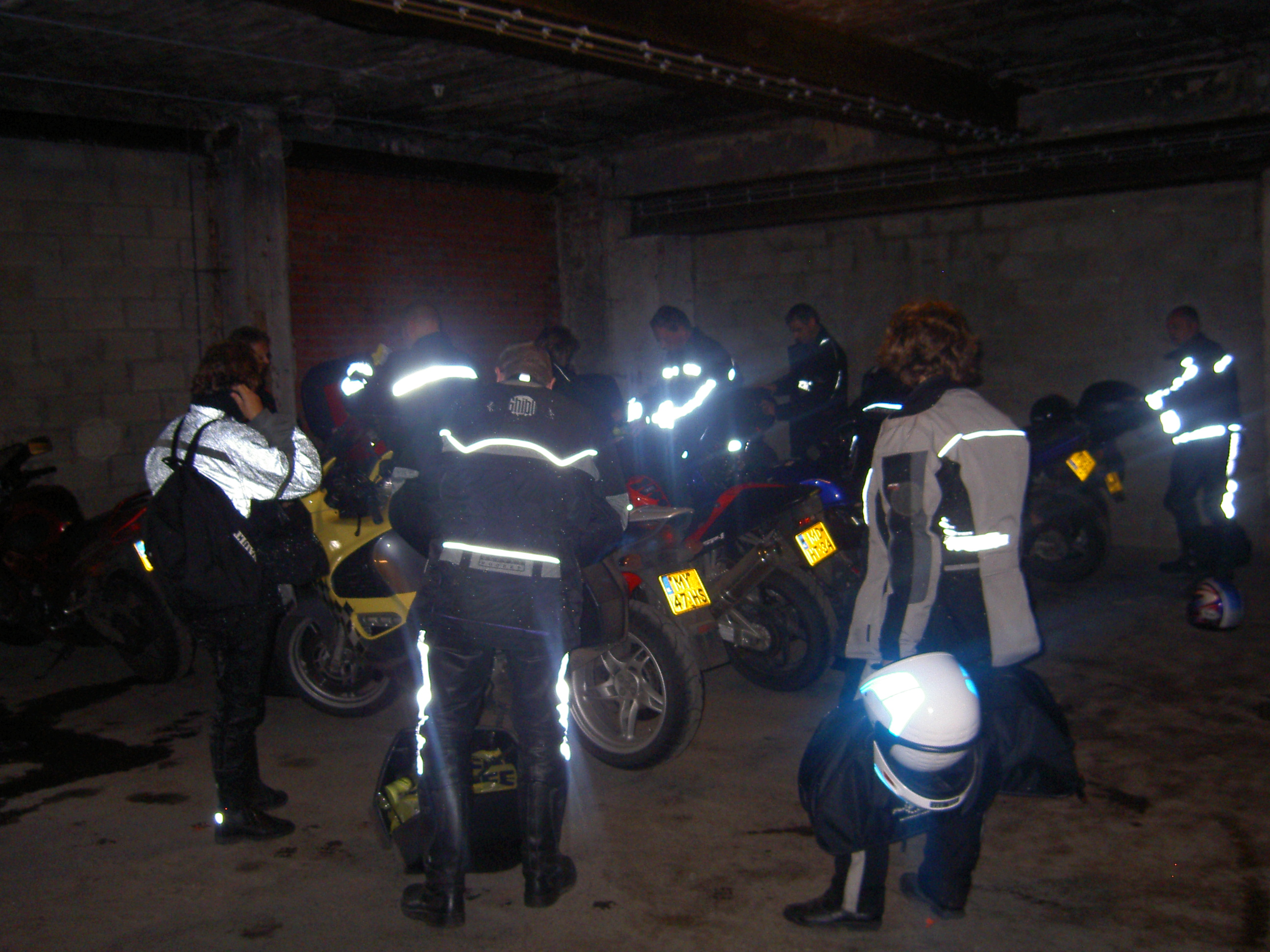 Toestemming van Henk Elshout